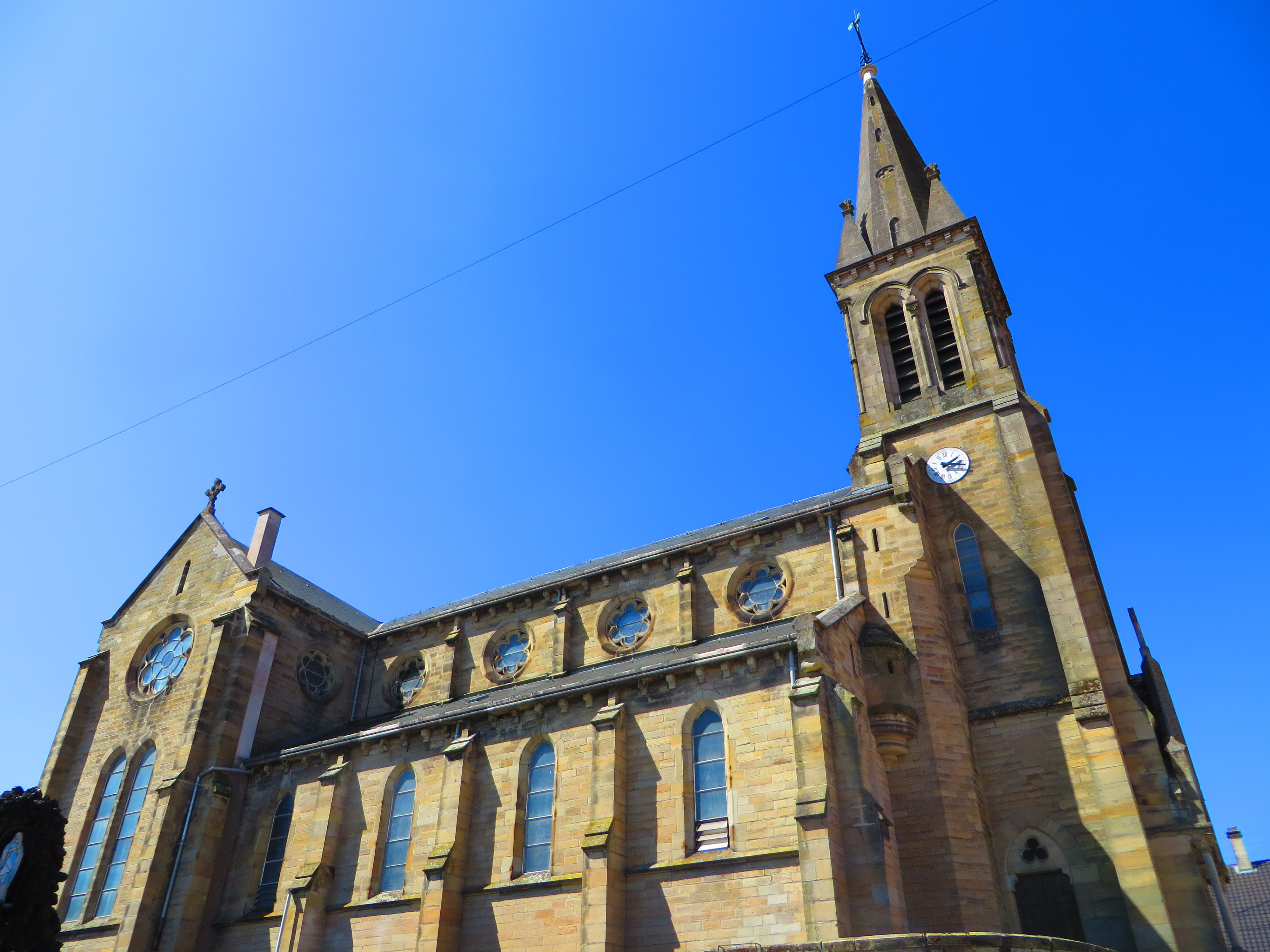 Farschviller eglise